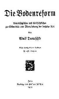 Innere Titelseite des Buches "Bodenreform" von A. Damaschke († 1935)